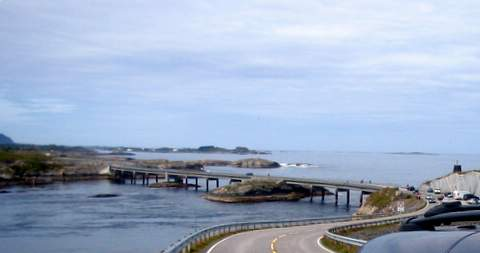 Atlanterhavsveien, Norway